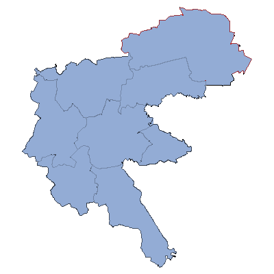 Mapa powiatu raciborskiego.